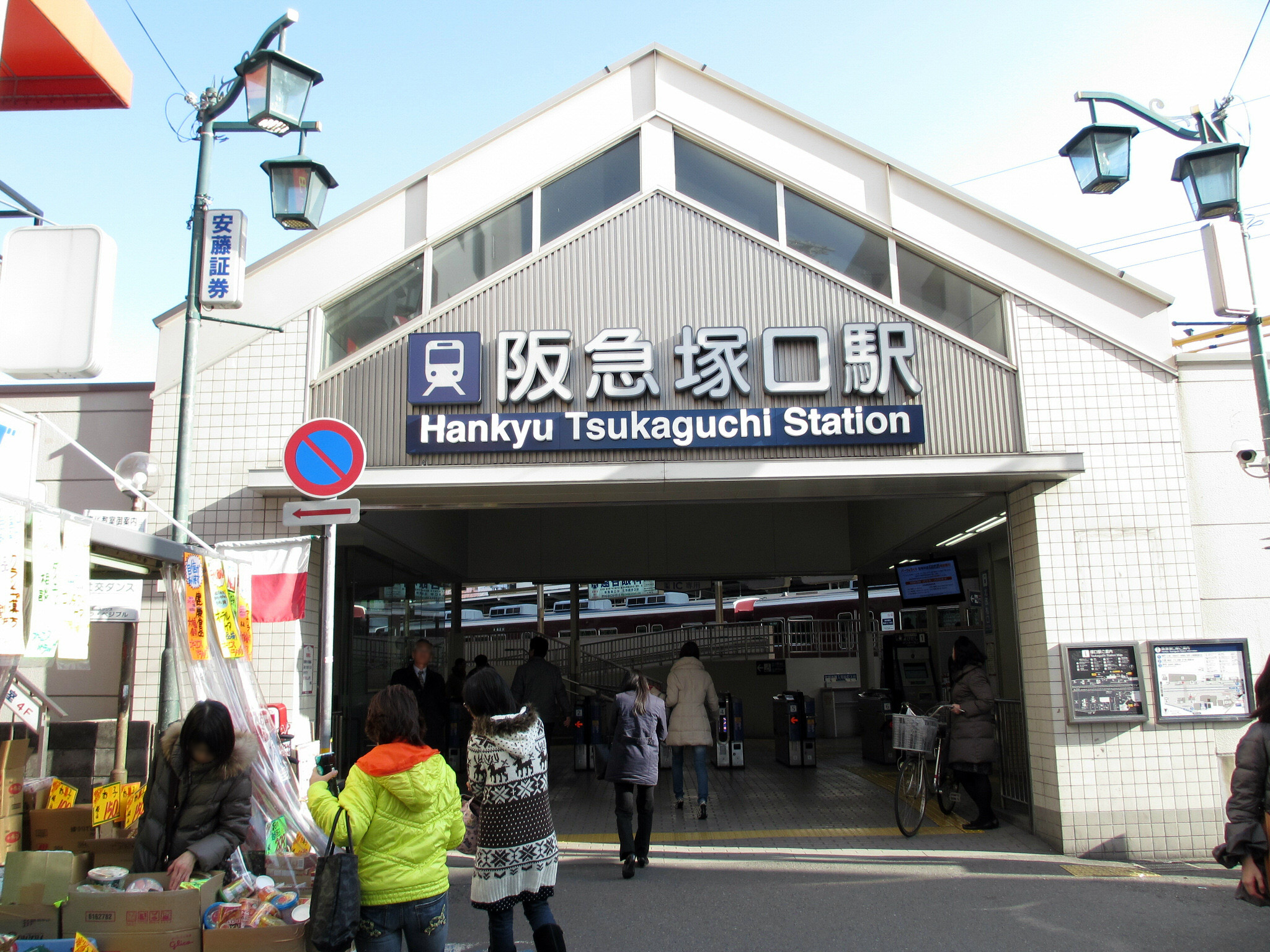 Hankyu Tsukaguchi Station